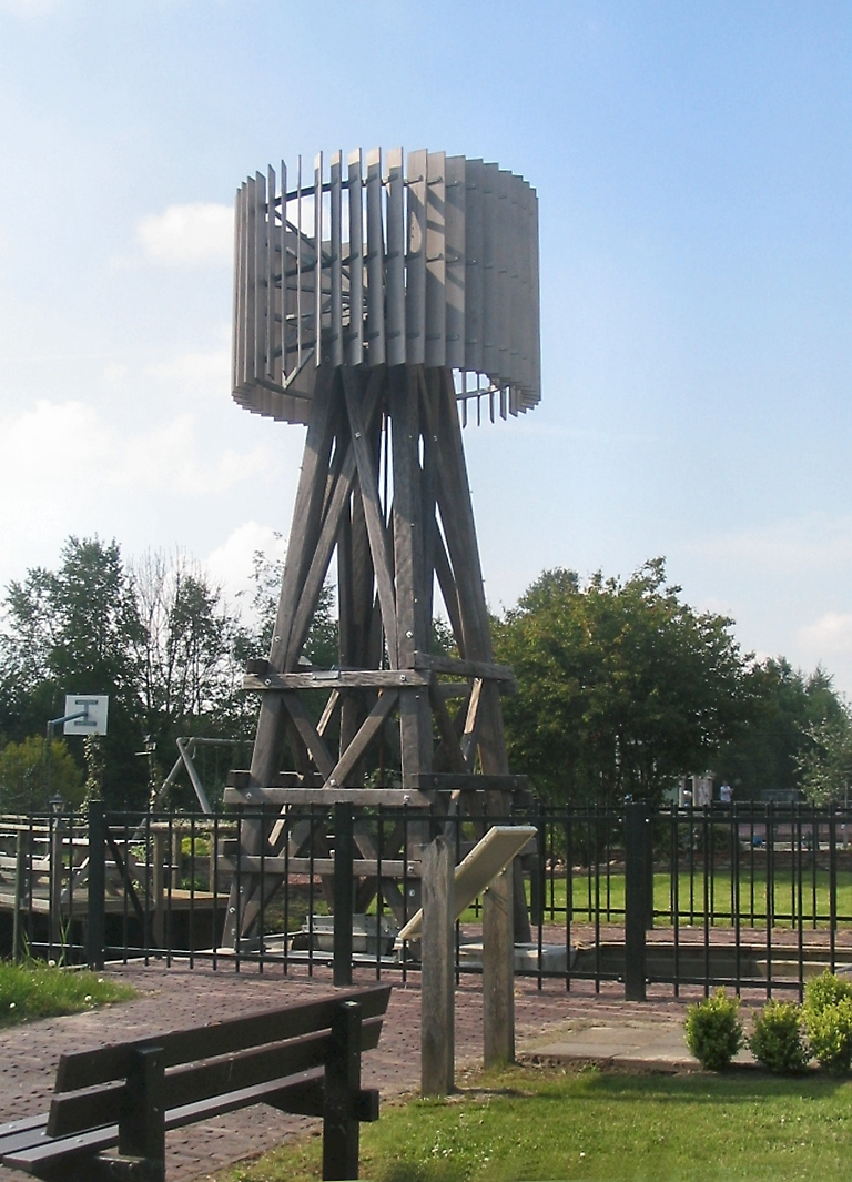 Door de uploader zelf gemaakte foto.